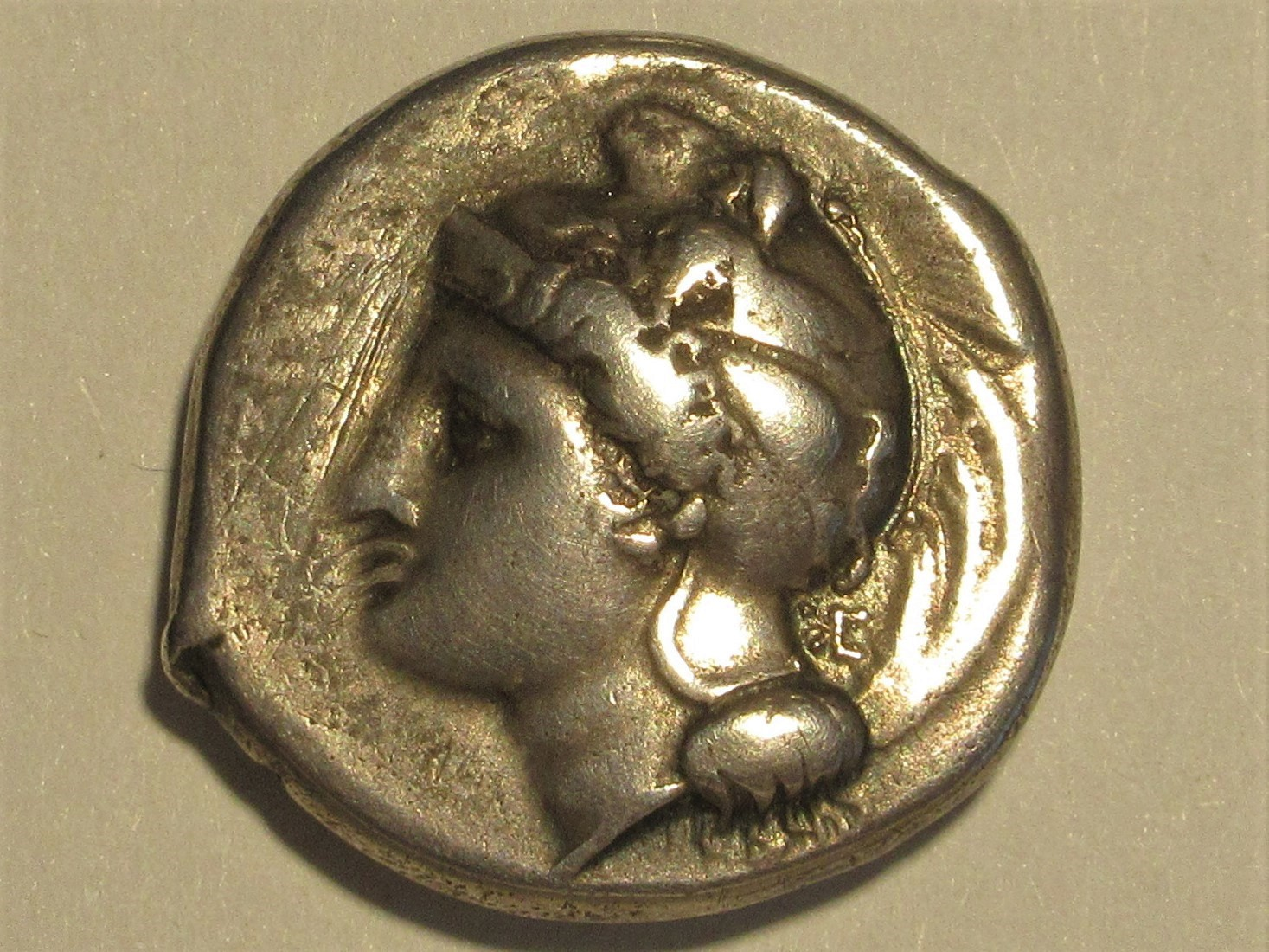 Stater aus Elea, ca. 340-310 v.Chr., SNG Cop 1563